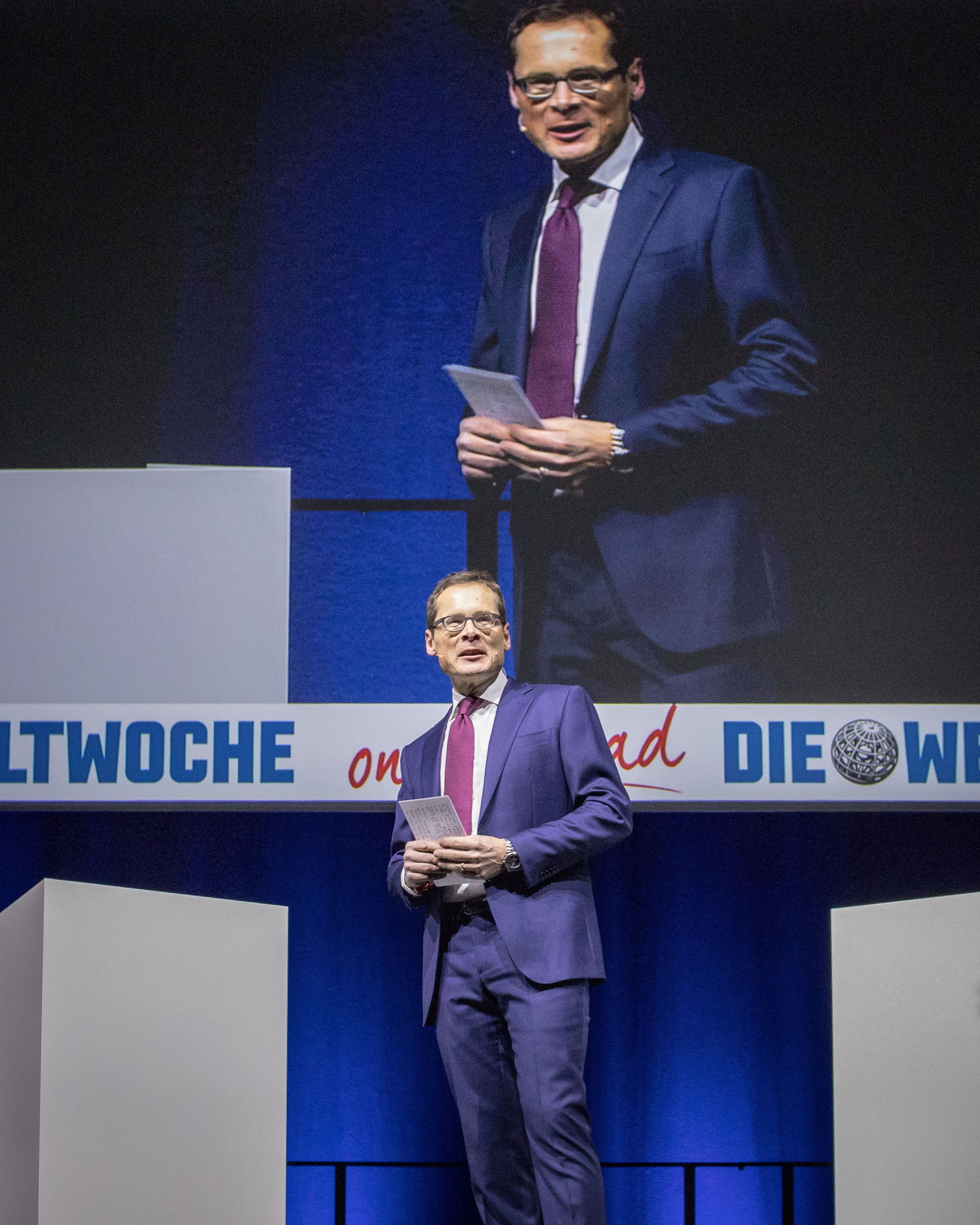 Roger Köppel, Chefredaktor der Weltwoche, bei einer Veranstaltung im März 2018, bei der Stephen Bannon dabei war.